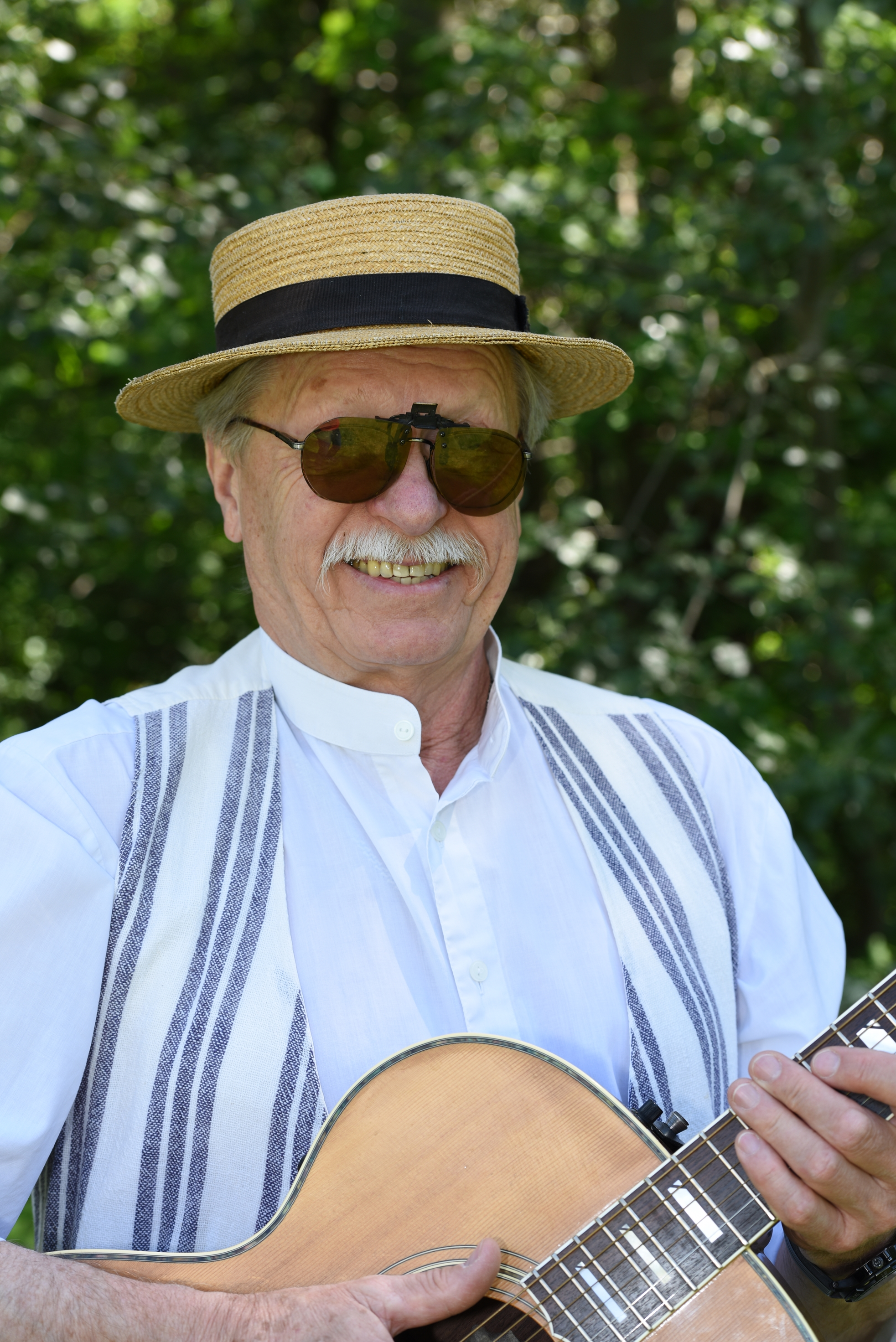 Leszek Krzywiec - członek polskiego zespołu muzycznego Kapela Warszawska.